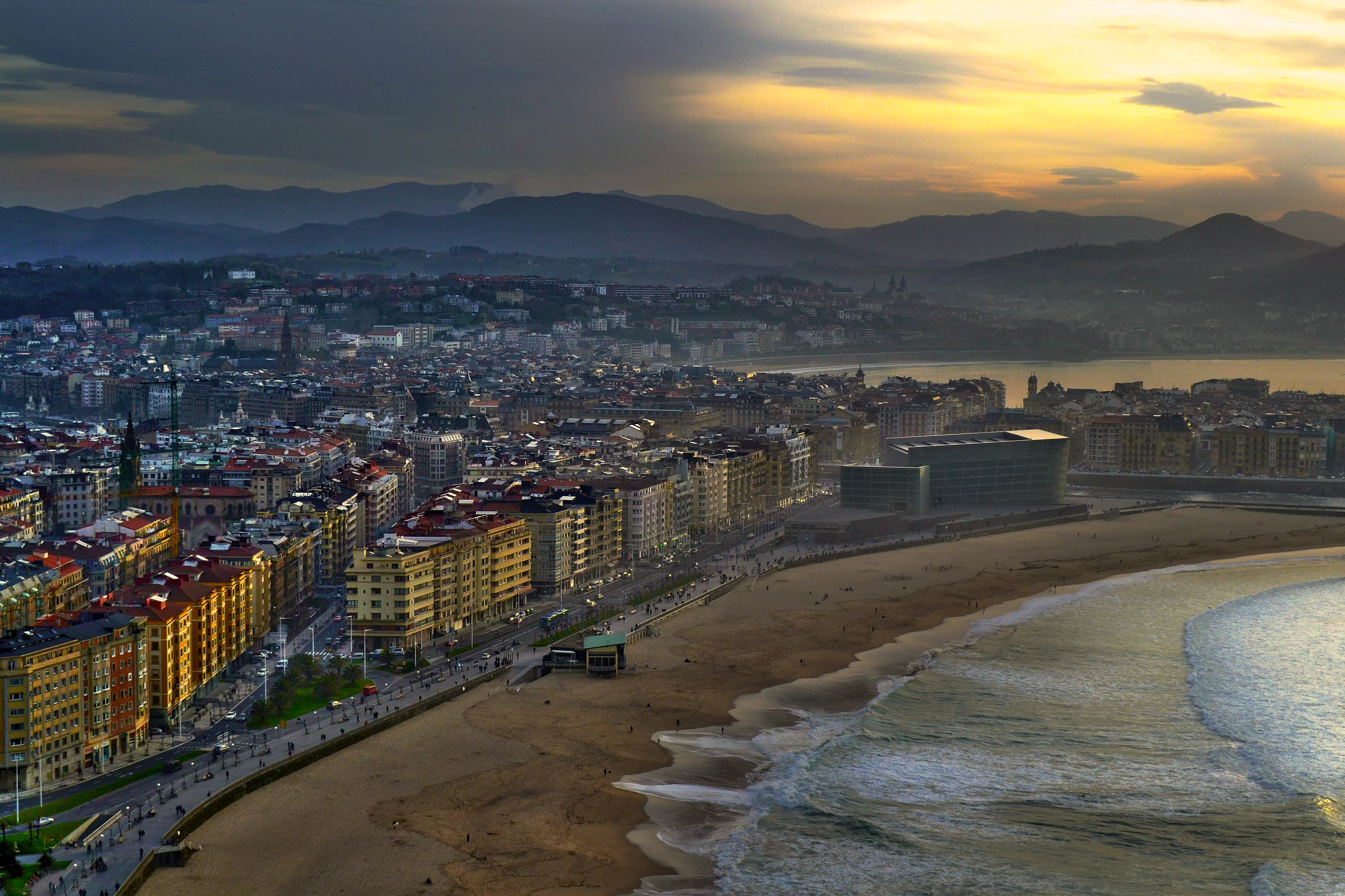 Zurriolako hondartza. Donostia, Gipuzkoa. Euskal Herria. Zurriola beach. Donostia, Gipuzkoa. Basque Country.